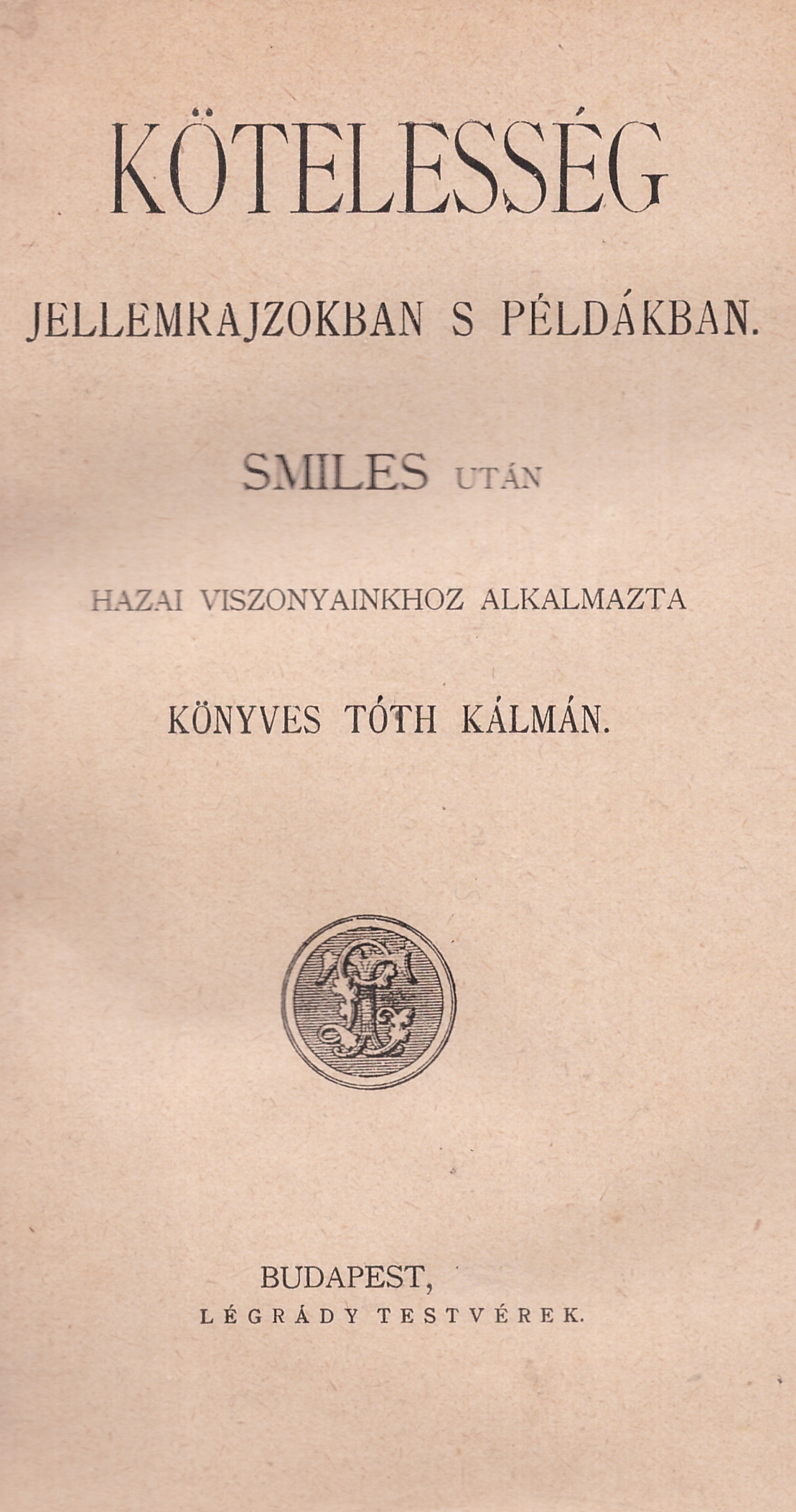 Samuel Smiles (1812-1904): Kötelesség – jellemrajzokban és példákban (Könyves Tóth Kálmán [1837-1924] fordítása, saját készítésű kép)